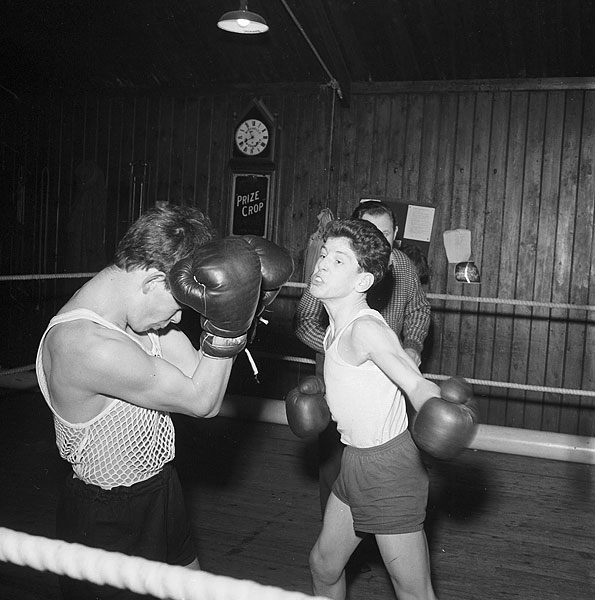 Teitl Cymraeg/Welsh title: Clwb Bocsio Amatur Porthaethwy Ffotograffydd/Photographer: Geoff Charles (1909-2002) Dyddiad/Date: February 7, 1963 Cyfrwng/Medium: Negydd ffilm / Film negative Cyfeiriad/Reference: (gch29947) Rhif cofnod / Record no.: 3471486 Rhagor o wybodaeth am gasgliad Geoff Charles yn Llyfrgell Genedlaethol Cymru More information about the Geoff Charles Collection at the National Library of Wales Mae ffotograffau Geoff Charles hefyd yn rhan o Broject Europeana Libraries, cliciwch yma am fwy o wybodaeth Geoff Charles' photographs also form part of the Europeana Libraries Project, click here for more information Dewch i weld arddangosfa ‘Dilyn y Fflam’ yn Llyfrgell Genedlaethol Cymru rhwng 31 Mawrth a 16 Mehefin, 2012 Come and visit the 'Following the Flame' exhibition at the National Library of Wales between 31 March and 16 June, 2012